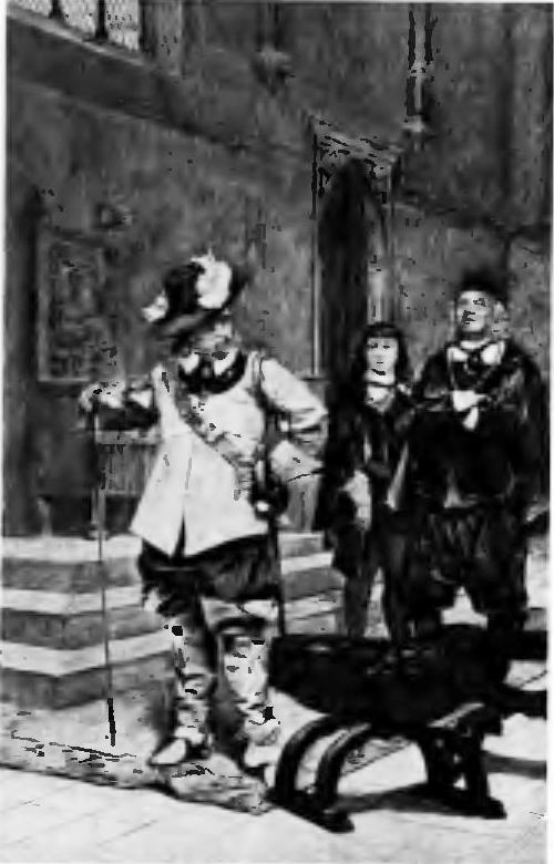 "Cromwell, look at me!" (Acte III, scène iv.)